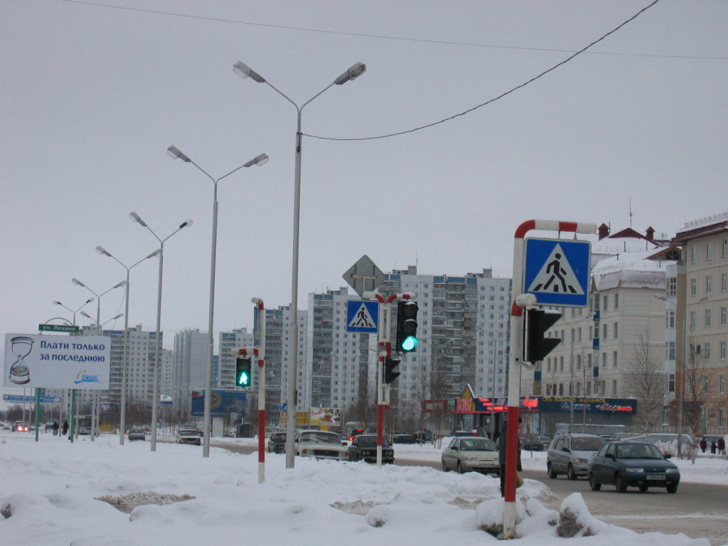 Nizhnevartovsk, West Siberia